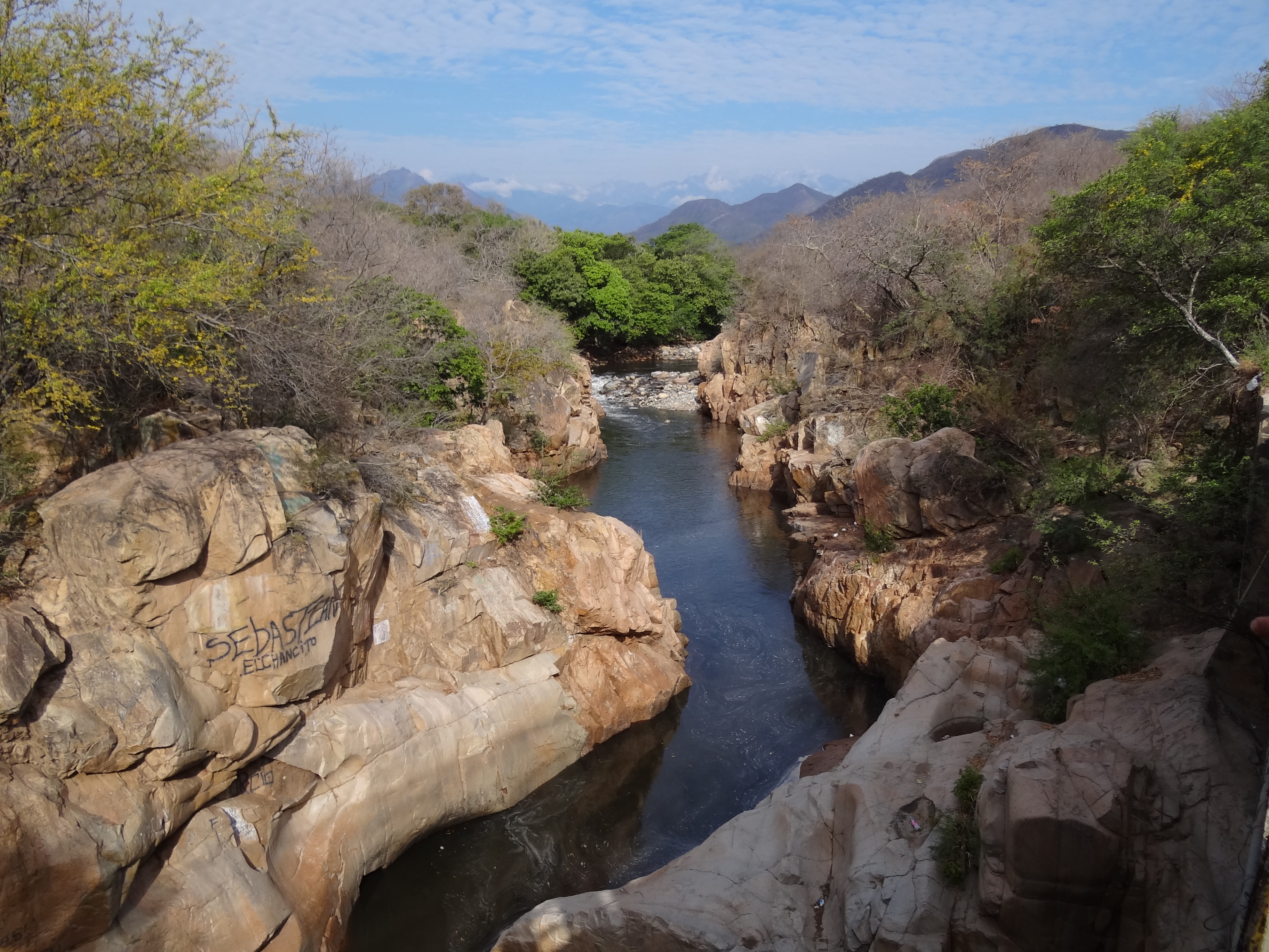 Río Guatapurí, en inmediaciones a la ciudad de Valledupar, departamento de Cesar, Colombia.